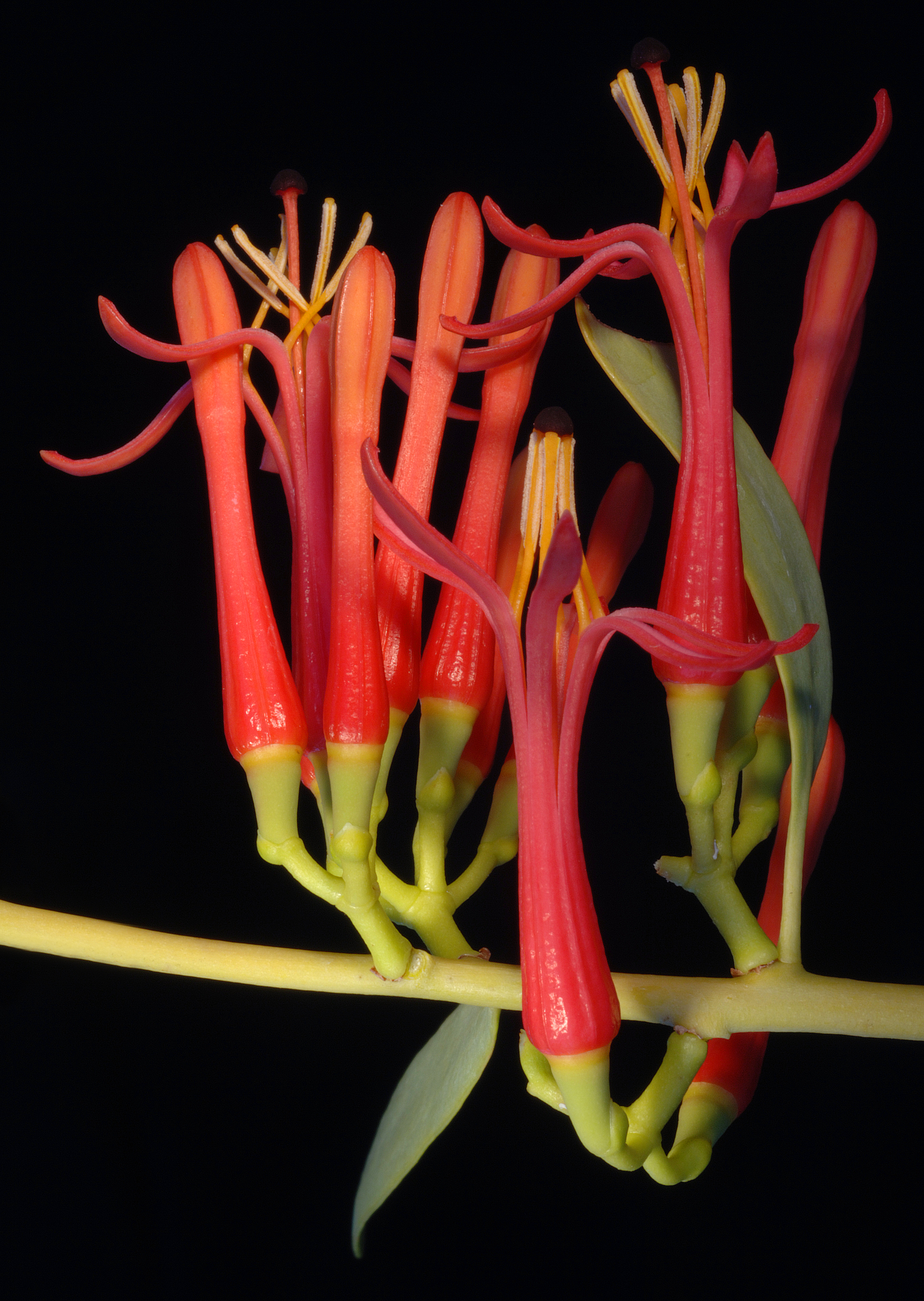 KRT3598